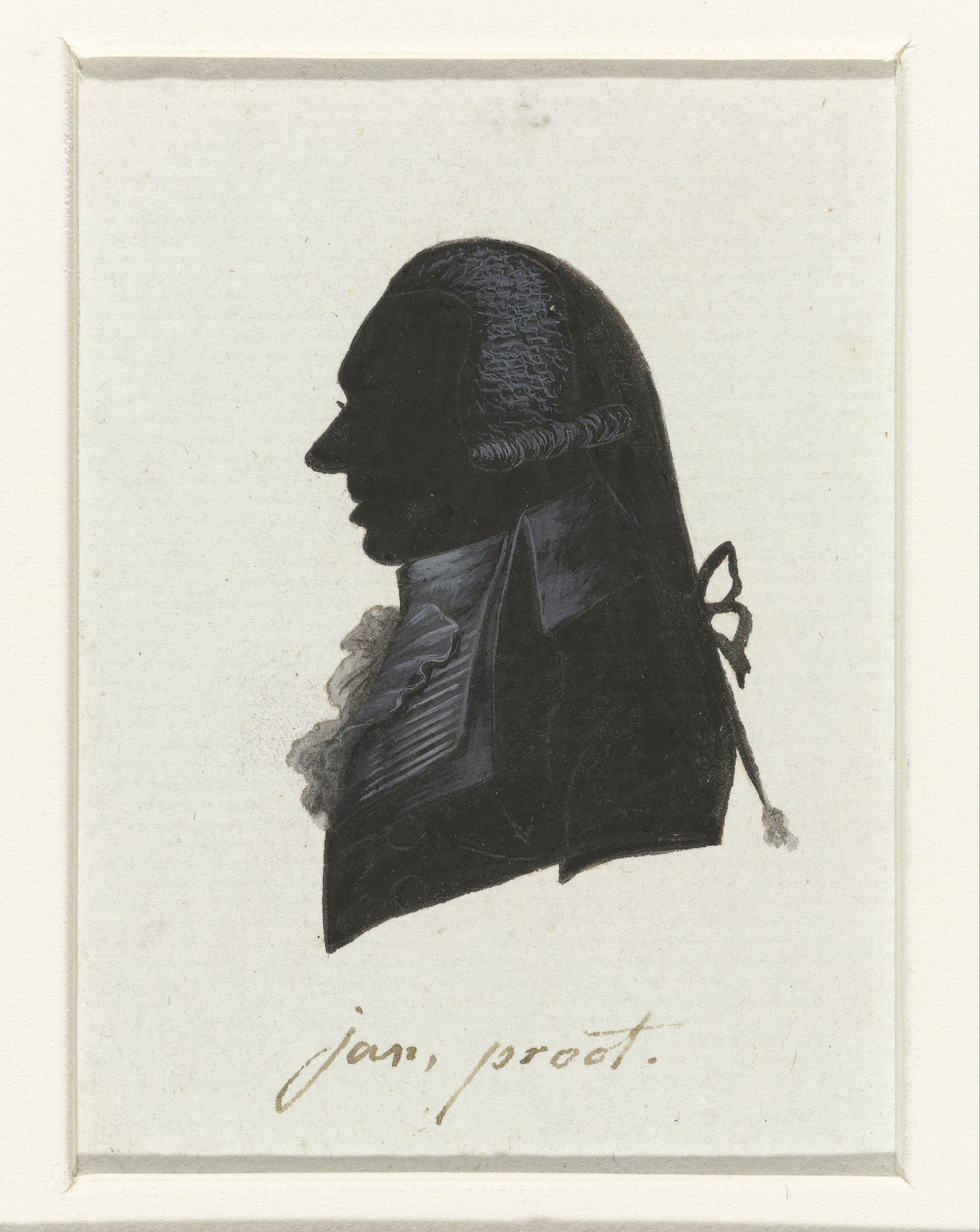 J. Proot. Tekening in Oost-Indische inkt, waarschijnlijk gemaakt door Hausdorff. De tekening behoort tot een serie van portretten van afgevaardigden naar de Eerste Nationale Vergadering in 1796-1797. Van de serie werden gravures gemaakt die zijn afgedrukt in "Geschiedenis der staatsregeling, voor het Bataafsche volk", een boek van Cornelius Rogge (1799).